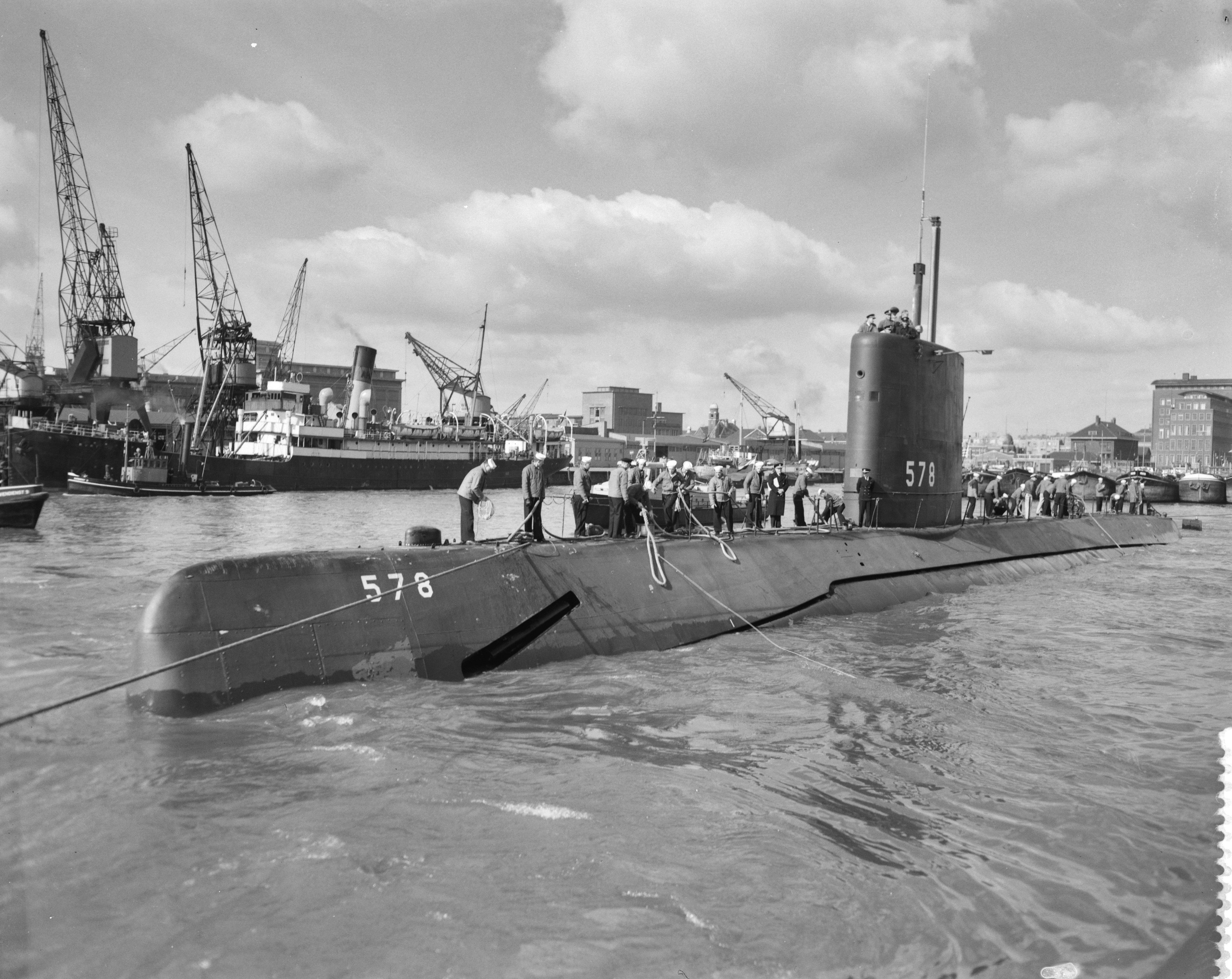 Collectie / Archief : Fotocollectie Anefo Reportage / Serie : [ onbekend ] Beschrijving : Bezoek van de "Skale" Amerikaans atoomduikboot aan Rotterdam Datum : 15 maart 1958 Locatie : Rotterdam, Zuid-Holland Trefwoorden : atoomduikboten, bezoeken Fotograaf : Behrens, Herbert / Anefo Auteursrechthebbende : Nationaal Archief Materiaalsoort : Negatief (zwart/wit) Nummer archiefinventaris : bekijk toegang 2.24.01.04 Bestanddeelnummer : 909-4076